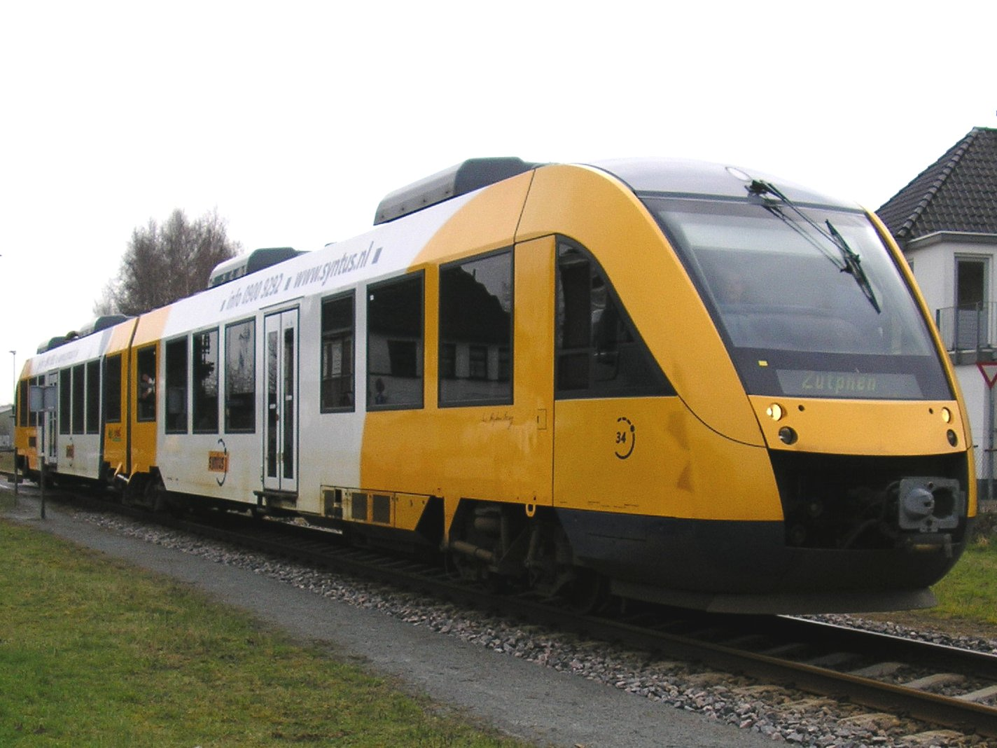 Syntus Lint 41h nummer 34 even na vertrek vanuit Winterswijk naar Zutphen